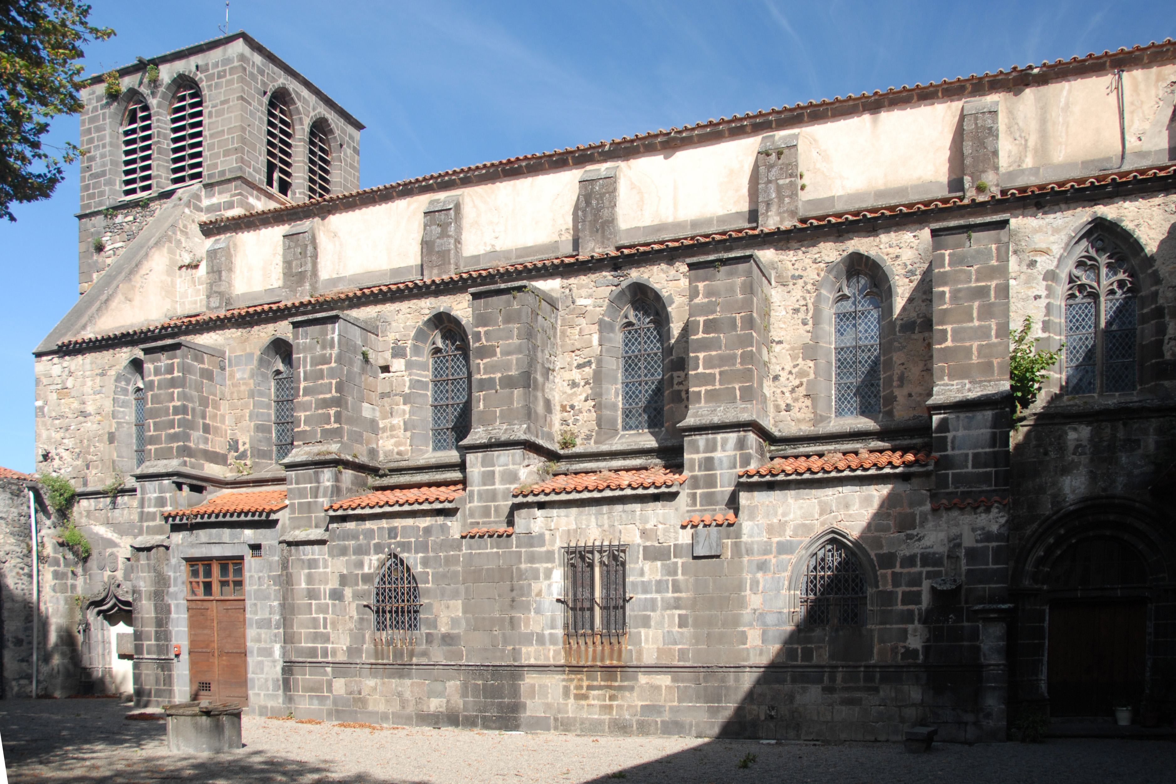 Mozat, Langhaus von S, Joch 1 - 6